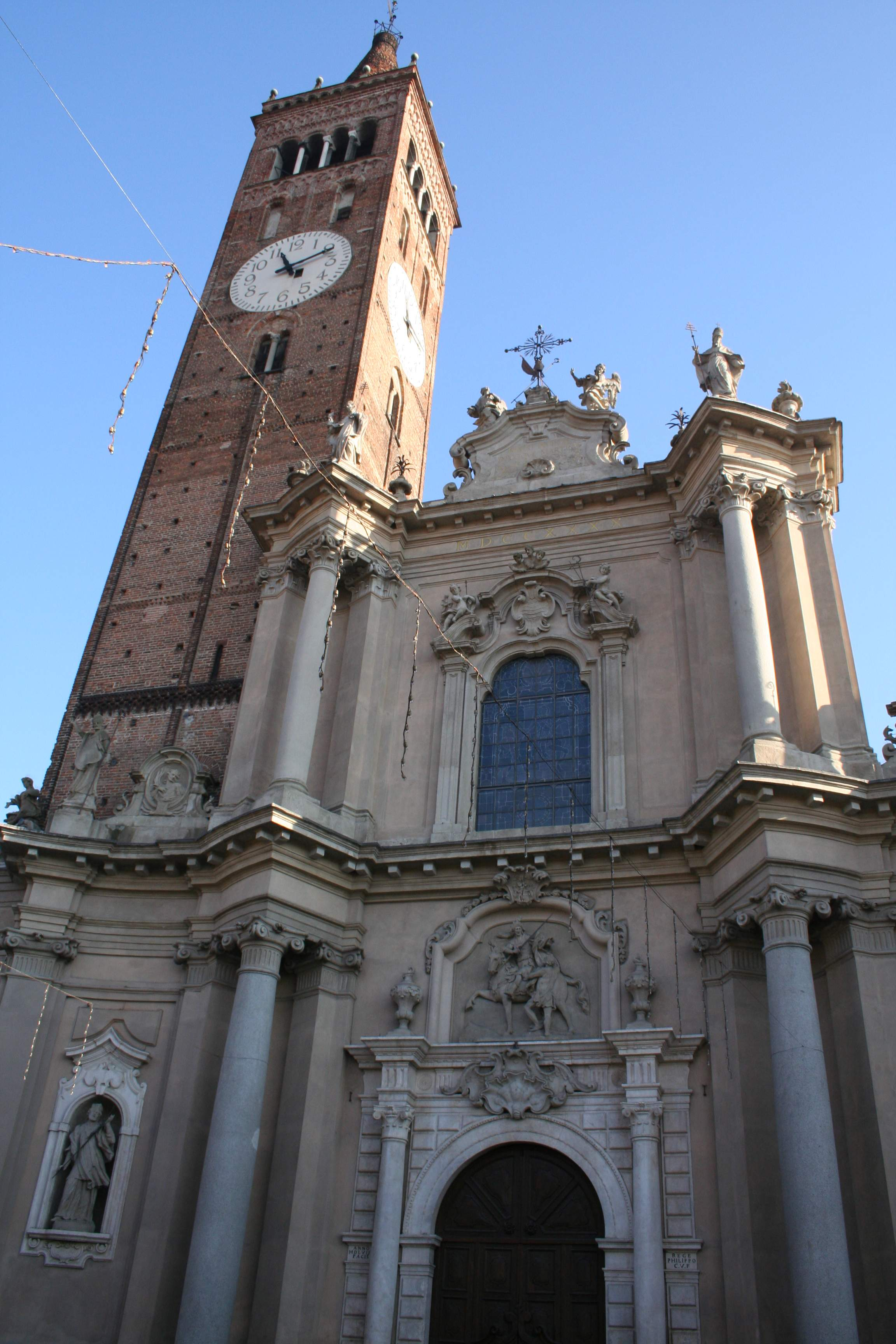 Autore Utente:Giorces:Giorces. Treviglio, parrocchiale San Martino.